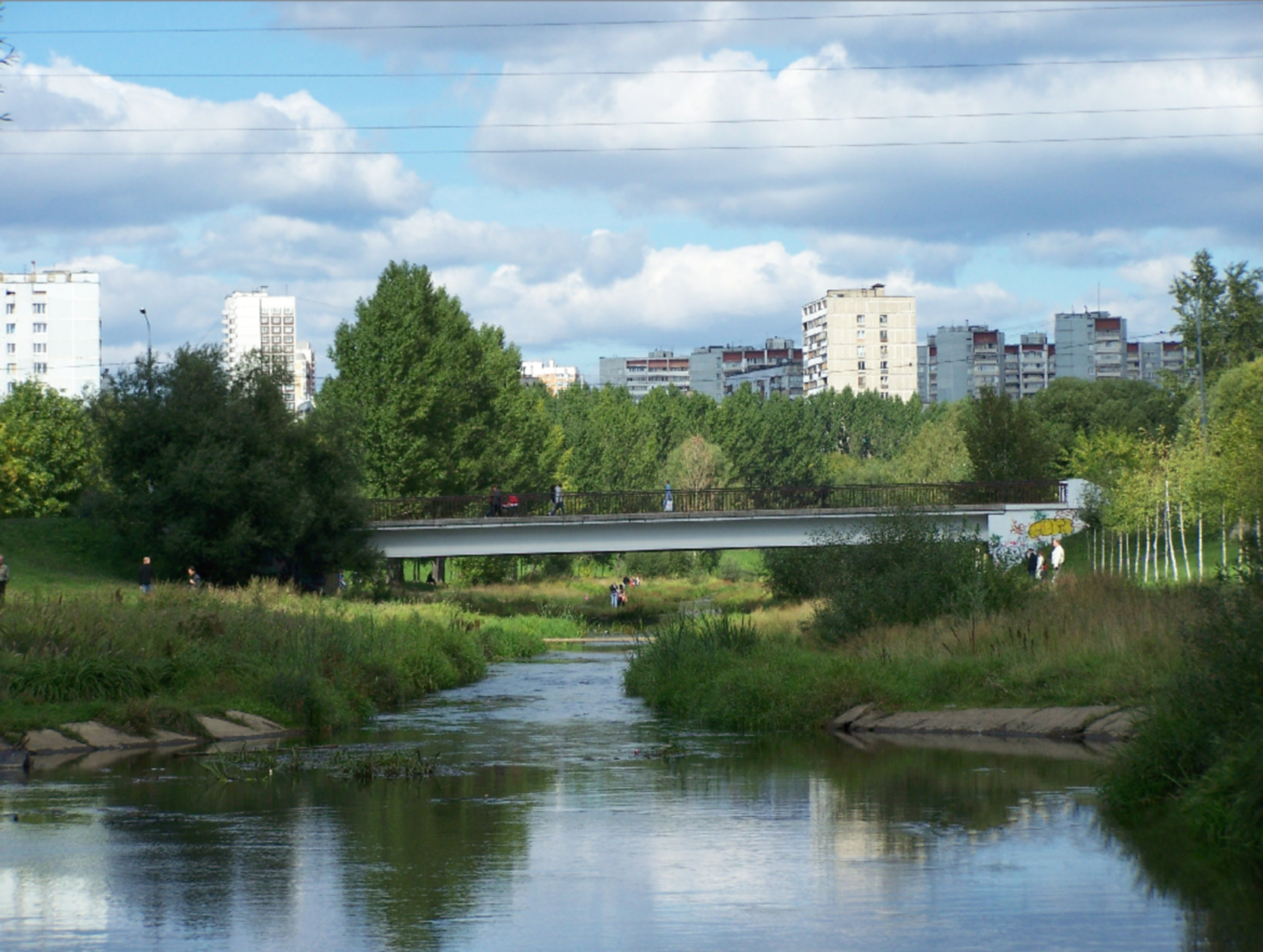 1-ый Медведковский мост на реке Яузе в Москве